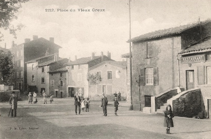 Izieux (Saint-Chamond), place du Vieux Creux. Vers 1905.